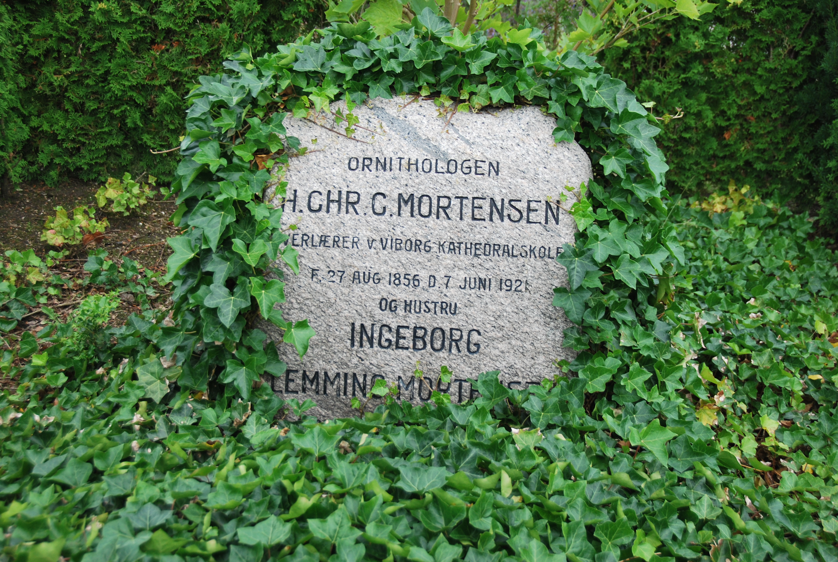 Gravsten for ornitolog Hans Christian Cornelius Mortensen og hustru Ingeborg Lemming Mortensen. Placeret på Viborg Kirkegård.